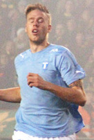 Pontus Jansson